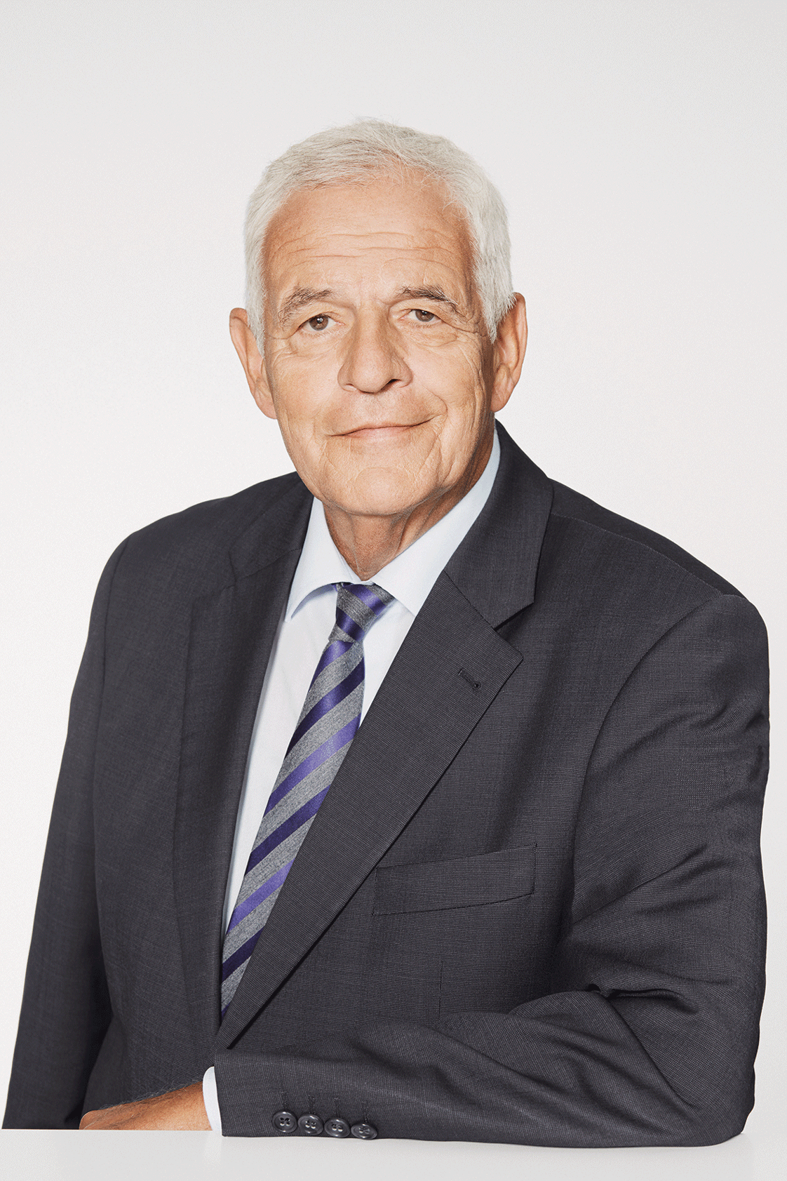 Rainer Stickelberger SPD Landtagsabgeordneter BW Depicted person: Rainer Stickelberger – German politician and lawyer